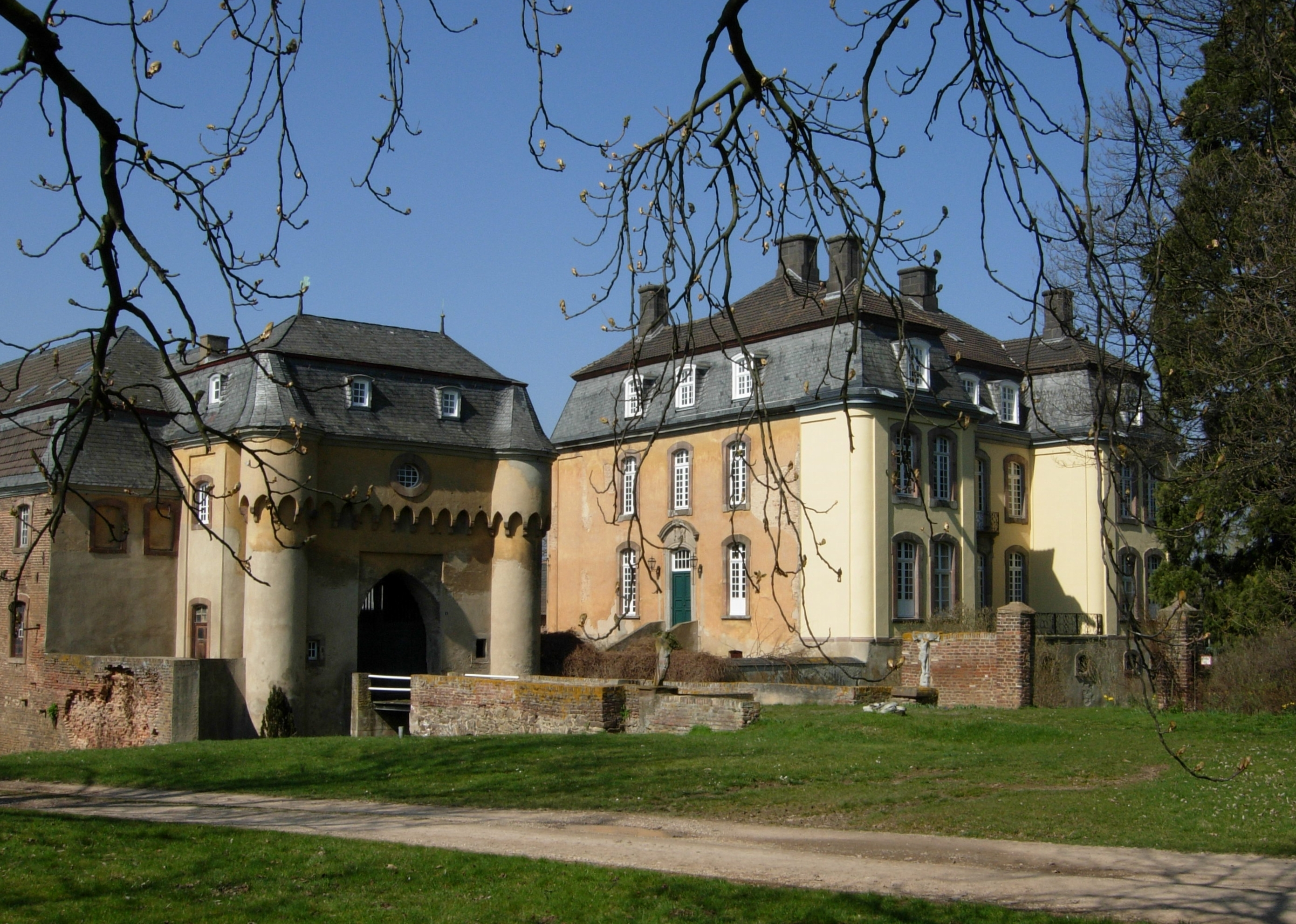 Große Burg Kleinbüllesheim in Euskirchen-Kleinbüllesheim (NRW), von SO aufgenommen